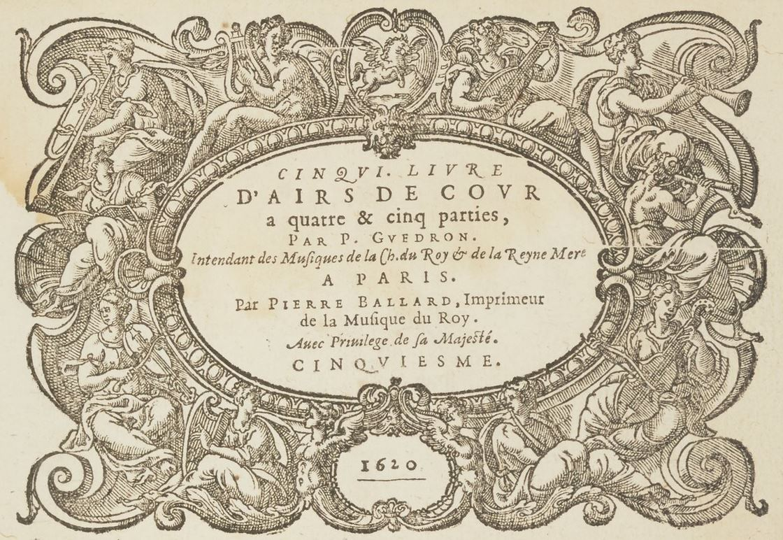 Title page of Cinquième livre d'airs de cour by P. Guédron, Paris, 1620.